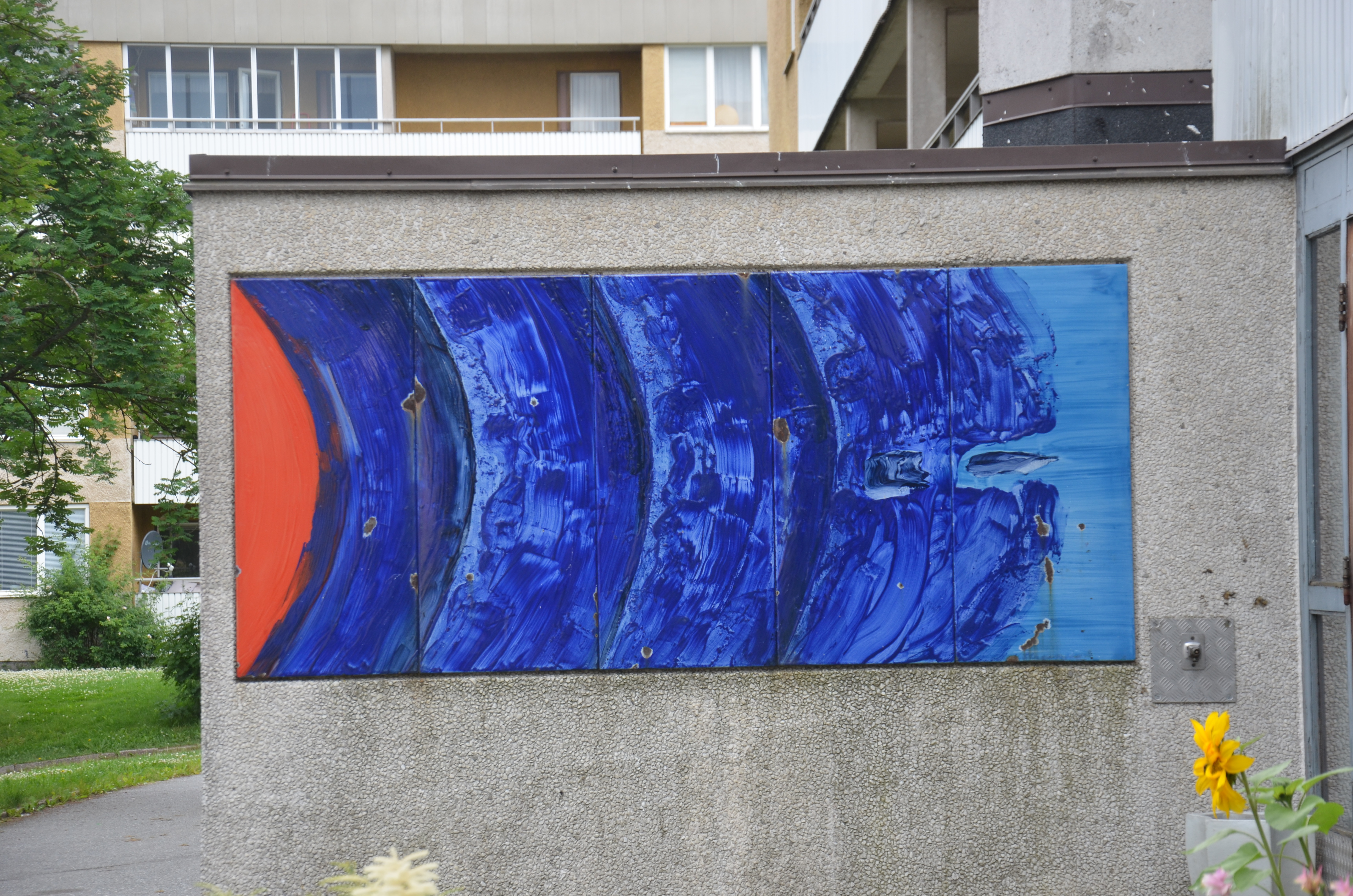 Nära naturen av Laris Strunke, emaljmålninmg i Östbergahöjden i Stockholm, Tvååkersgrånd 8